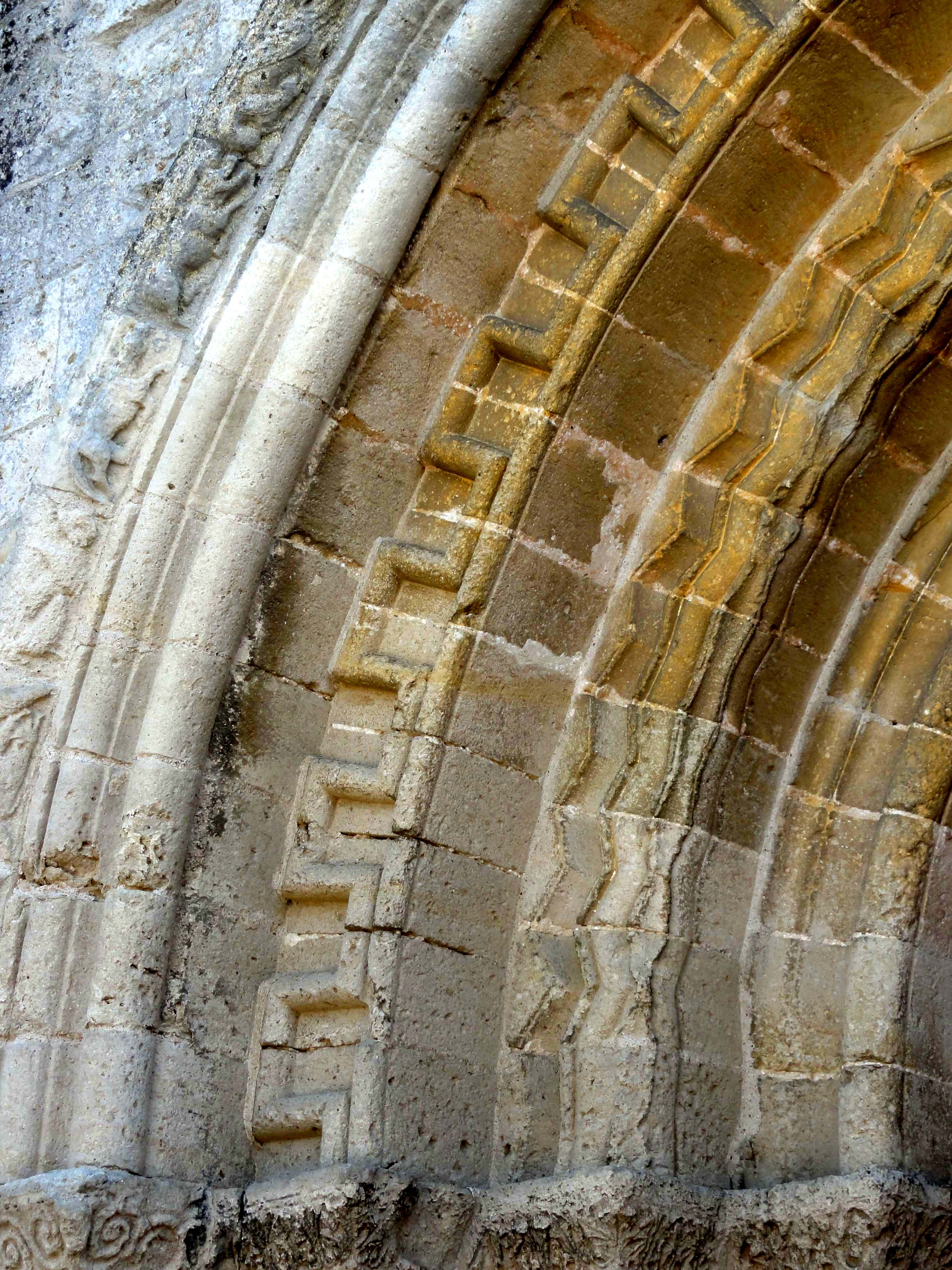 Intérieur de l'église - voir titre.